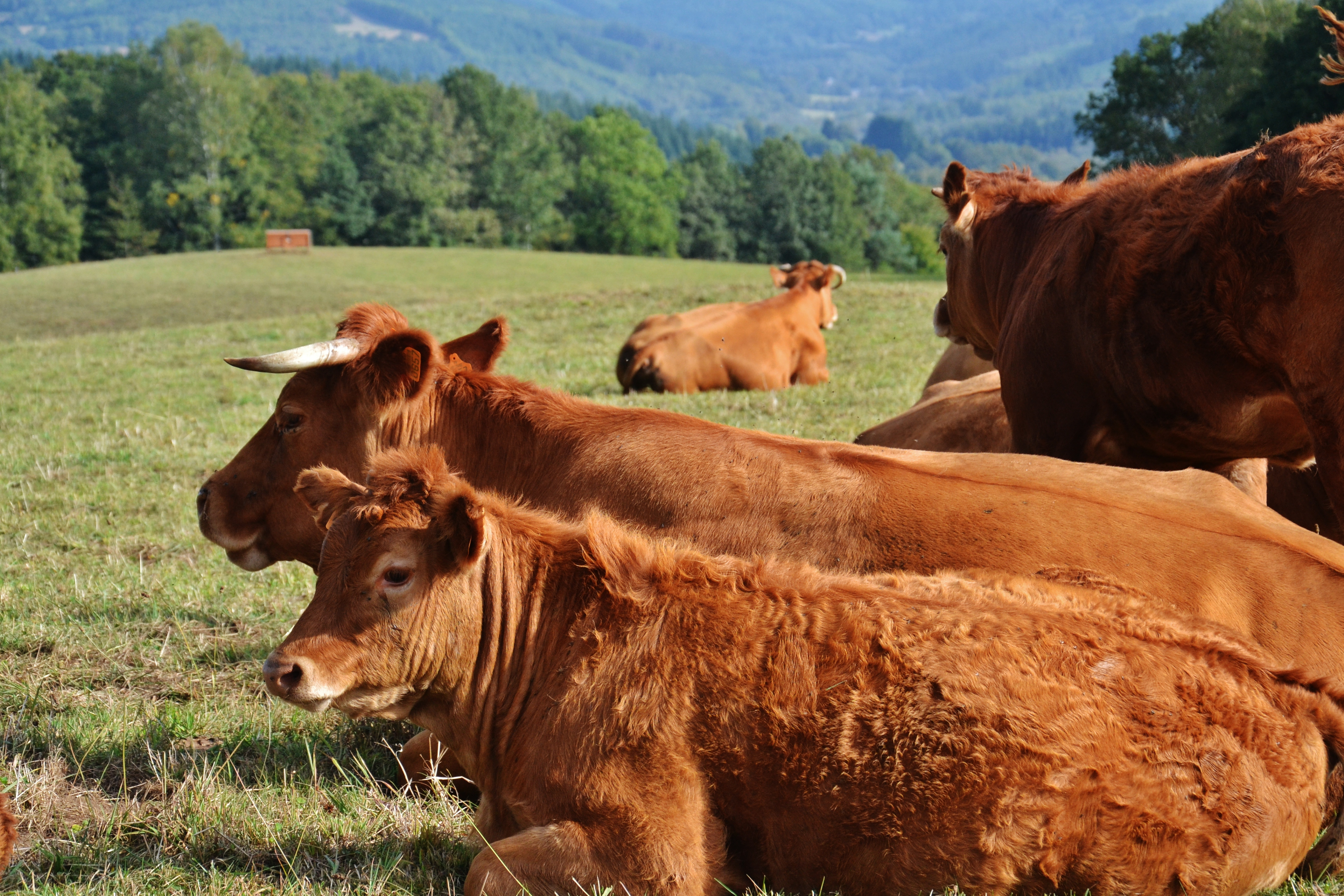 Limousines près de Rempnat (Haute-Vienne, France)